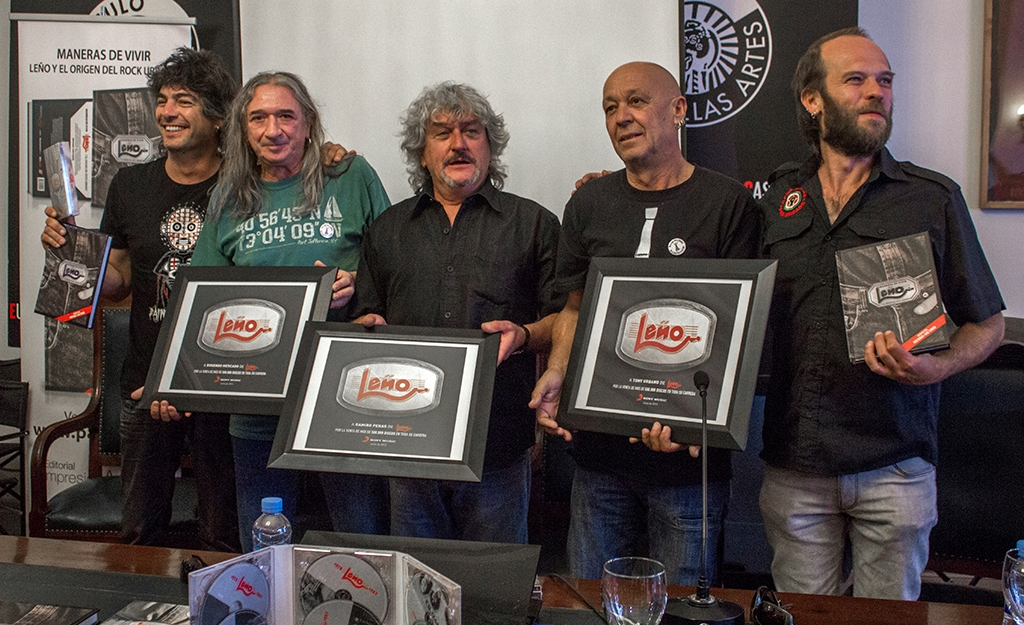 Presentación de la biografía de Leño escrita por Kike Babas y Kike Turrón, así como un nuevo disco-recopilatorio y el reconocimiento a los más de 500.000 discos vendidos a lo largo de los años.